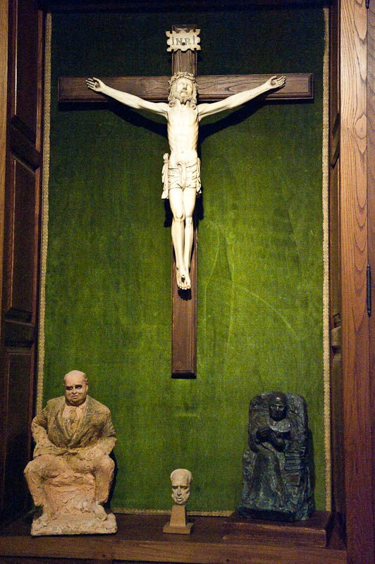 Cristo filipino de marfíl. S XVIII. Terracota representando a José Mª de Cossío realizada por Sebastián Miranda. Terracota representado el rostro de Alipio Pérez Tabernero por Sebastián Miranda Bronce realizado sobre diseño de Jesús Otero.